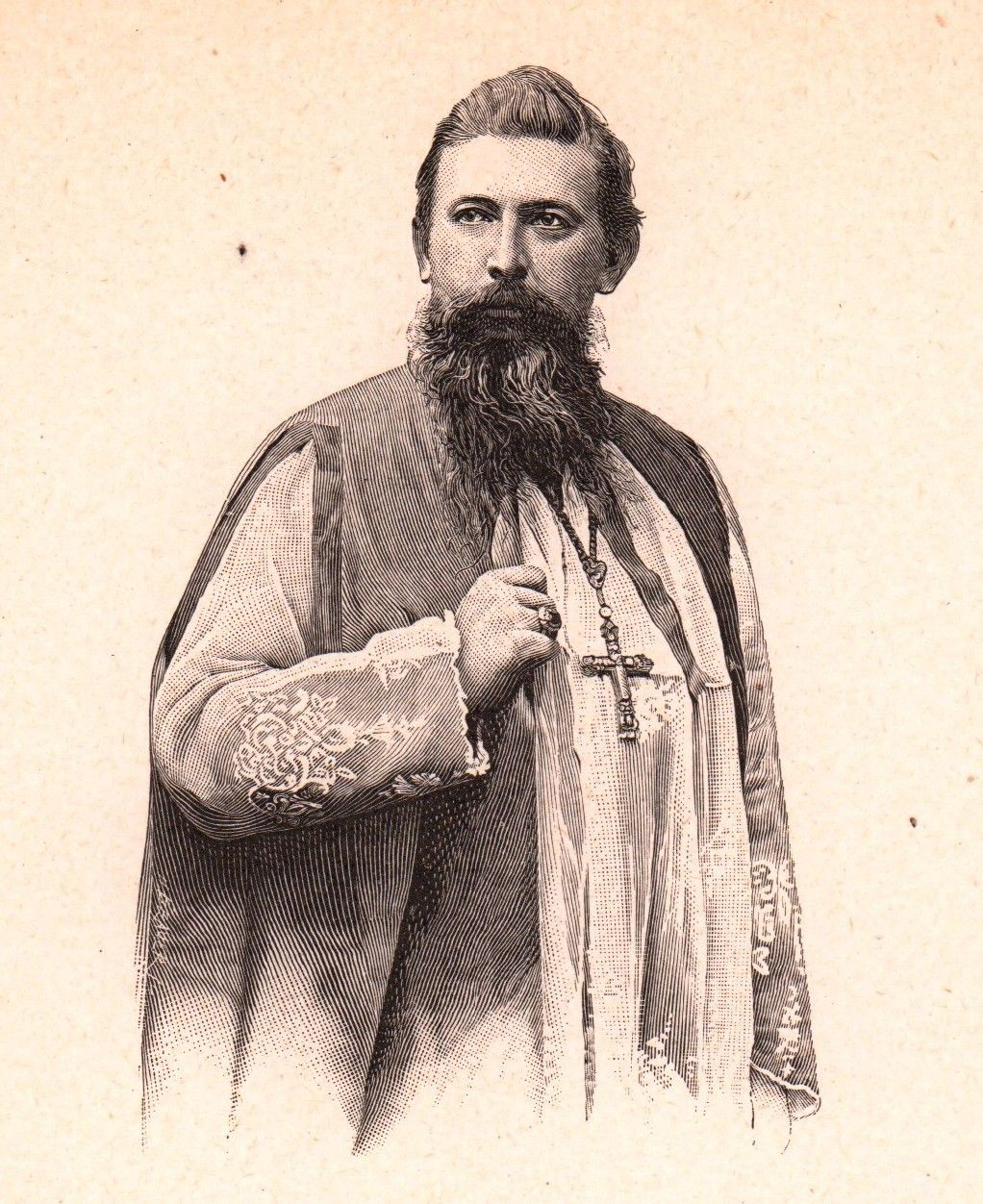 Mgr Le Roy, vicaire apostolique au Gabon